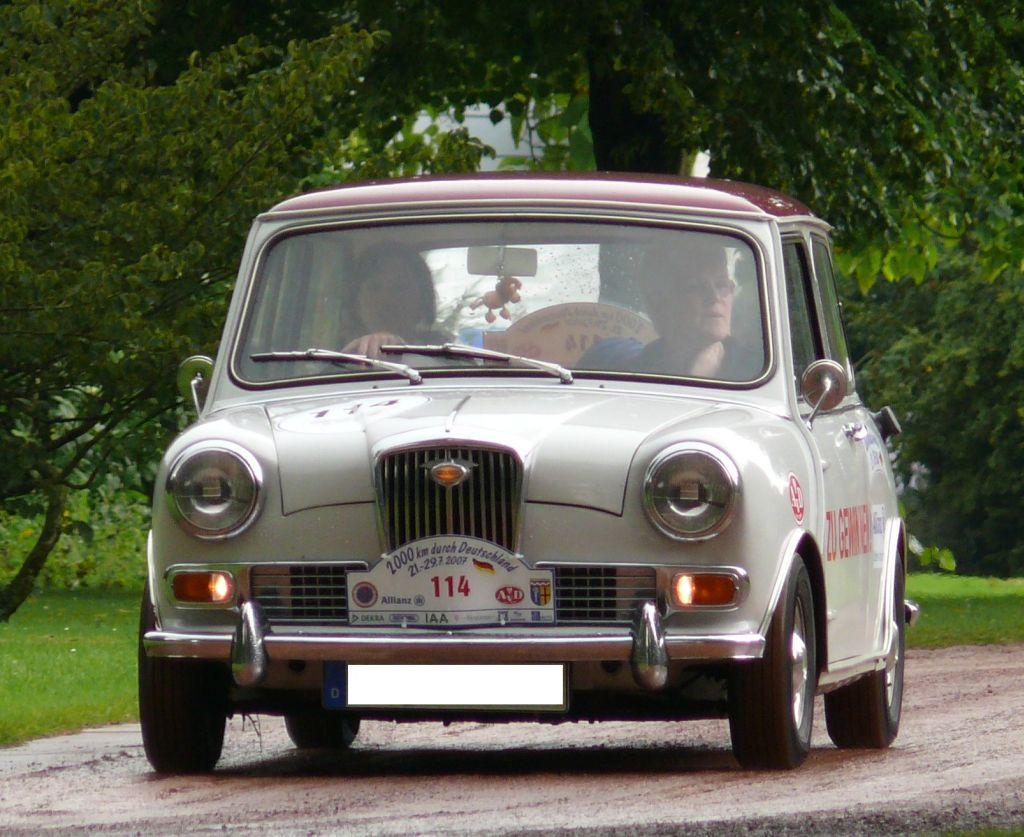 Wolseley Hornet MkII